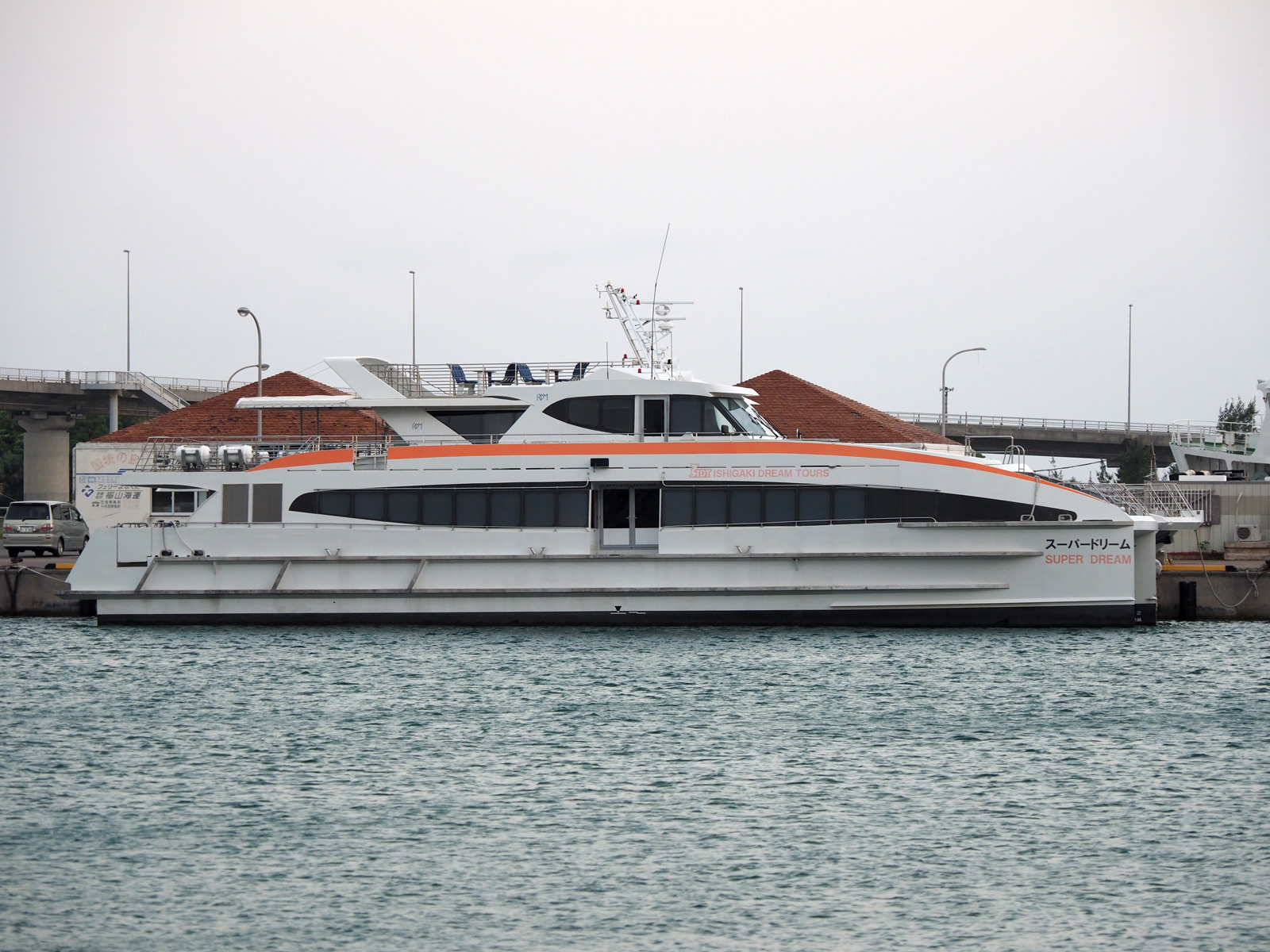 スーパードリーム（八石垣島ドリーム観光、石垣港にて）